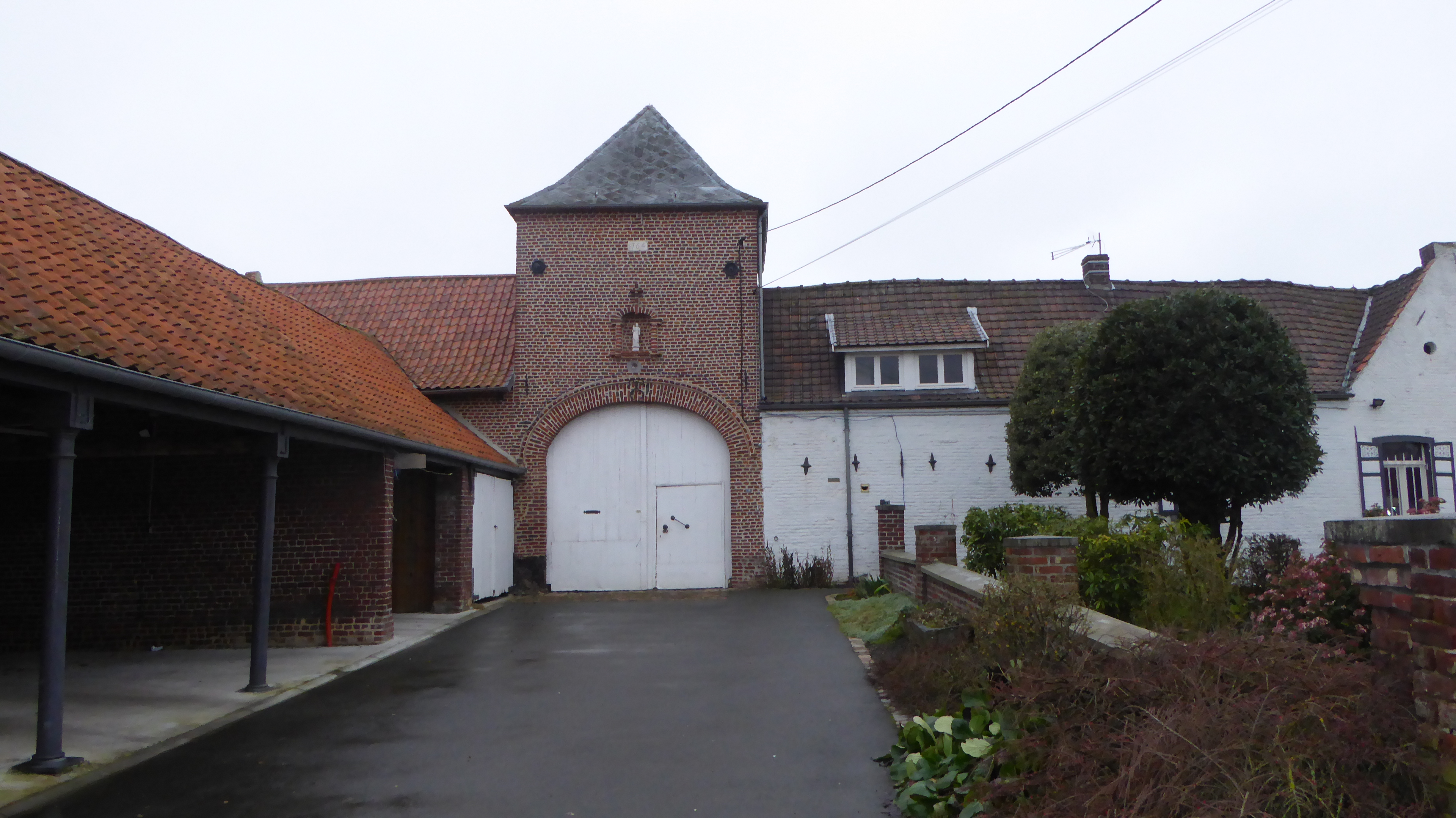 Nomain, 11 rue du Quimberge. L'ancienne ferme seigneuriale de 1764, dite cense Maurois .